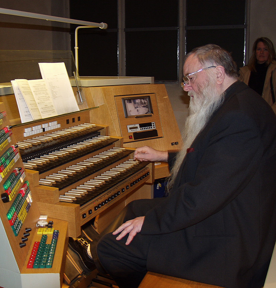 Peter Bares bei einem Improvisationskonzert anlässlich seines 70. Geburtstages in der Kunststation St. Peter, Köln